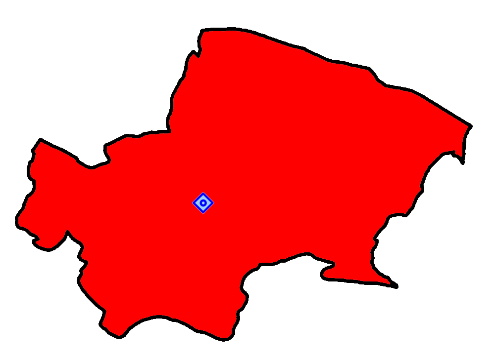 حوزهٔ انتخاباتی قم برای انتخابات مجلس شورای اسلامی